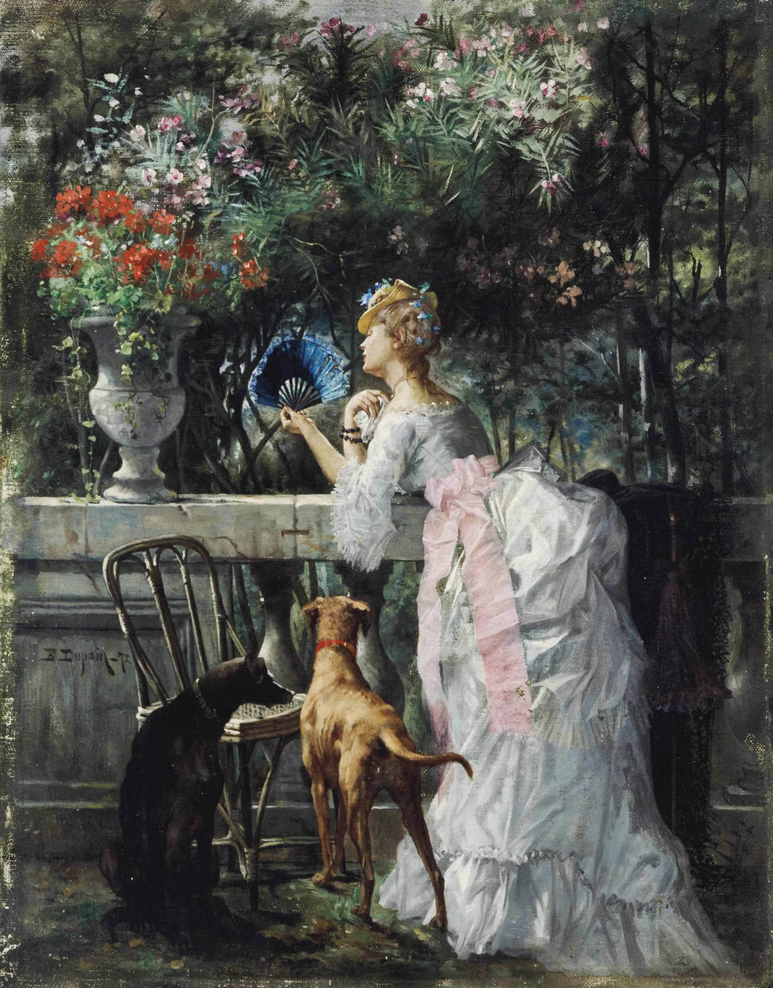 Femme dans le parc avec les chiens